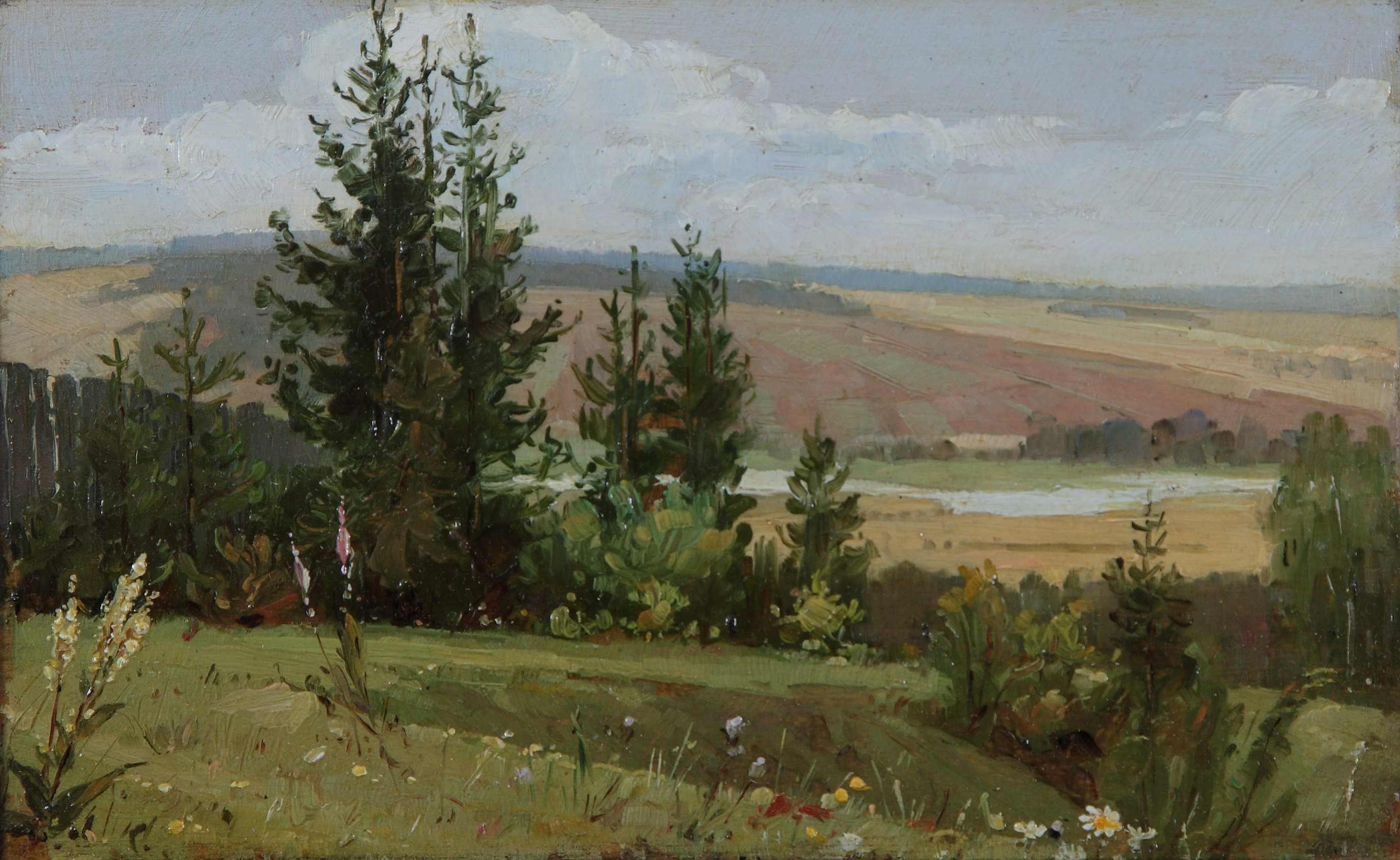 Картина Зеленина Алексея Несторовича (ум. 1944) - "В окрестностях села Ильинского", Пермская художественная галерея (холст, масло).